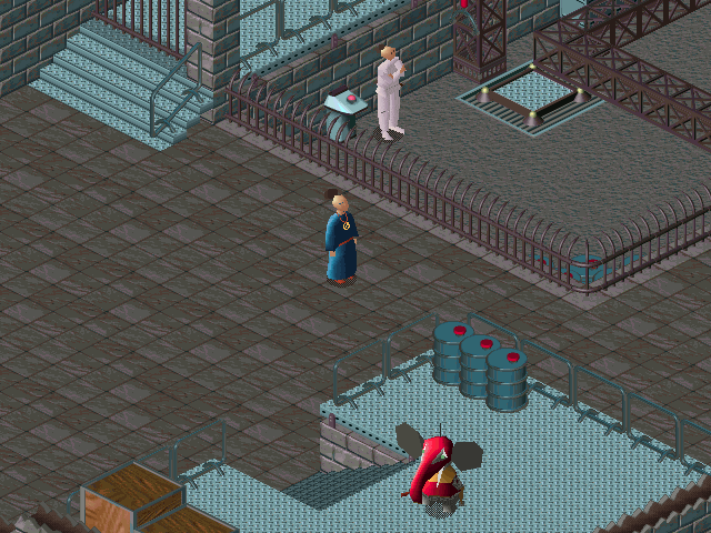 Capture d'écran du jeu vidéo Little Big Adventure (1994), développé par Adeline Software International.